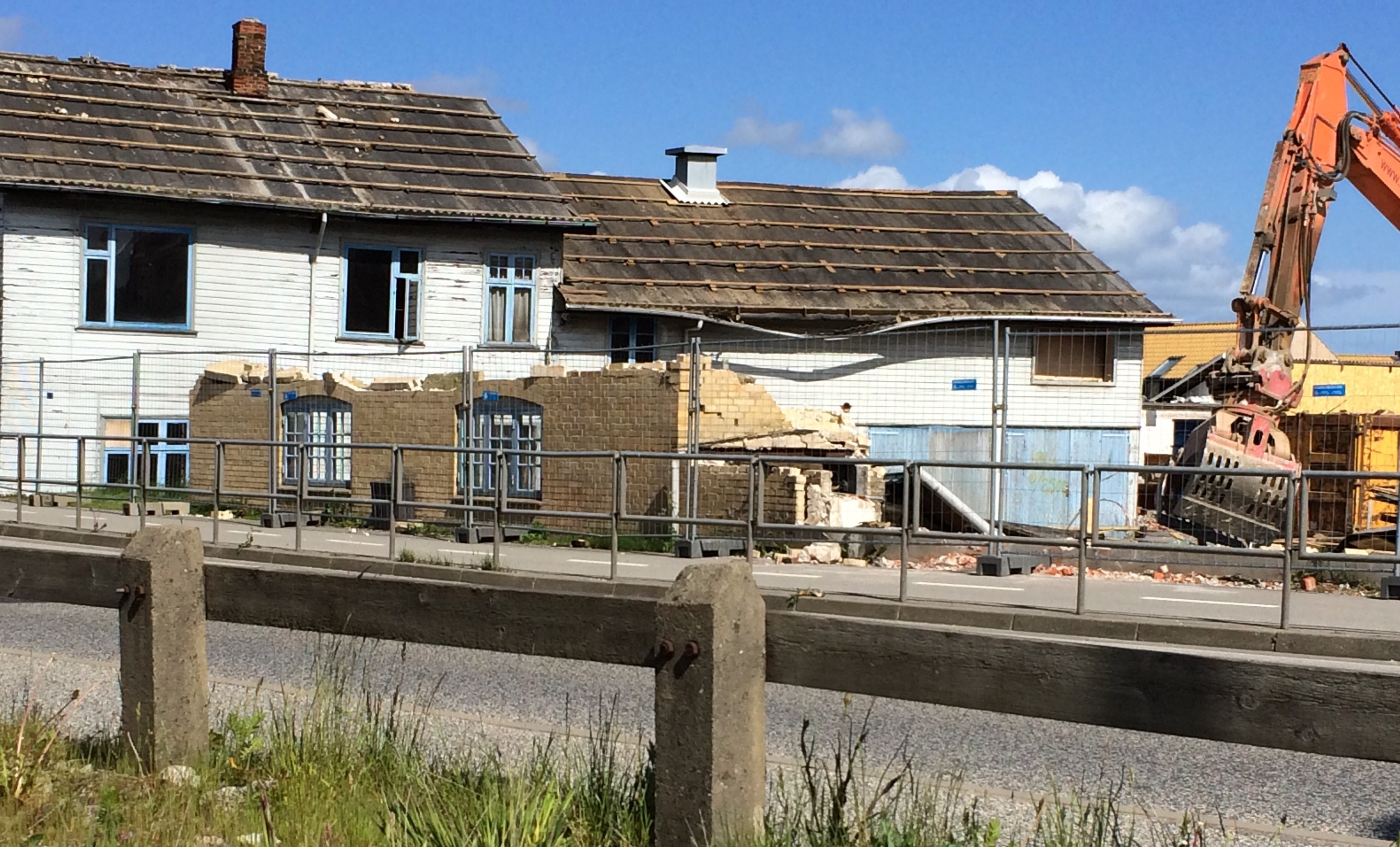 Maskinsnedkeriet 27. maj 2015